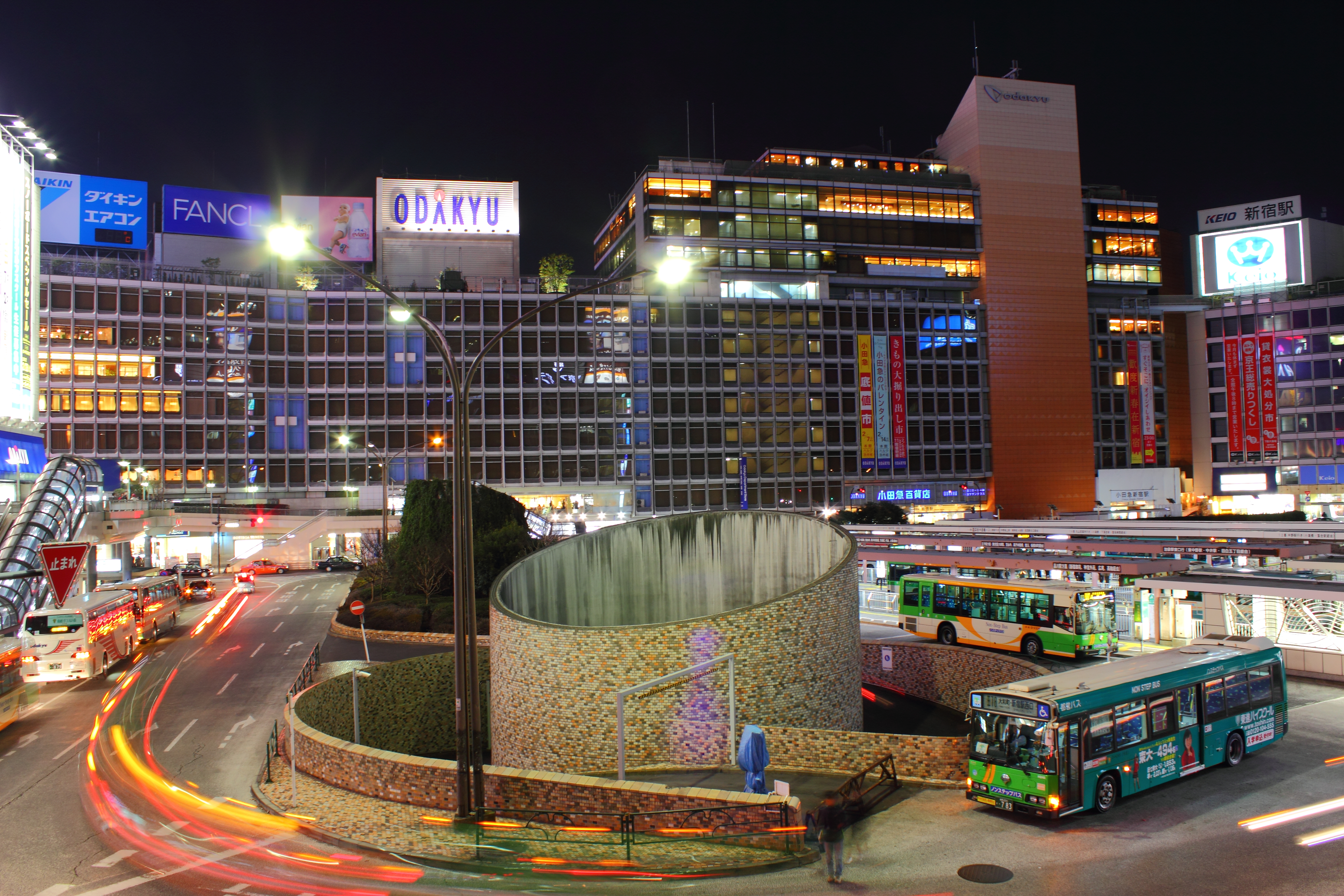 新宿駅西口ロータリー